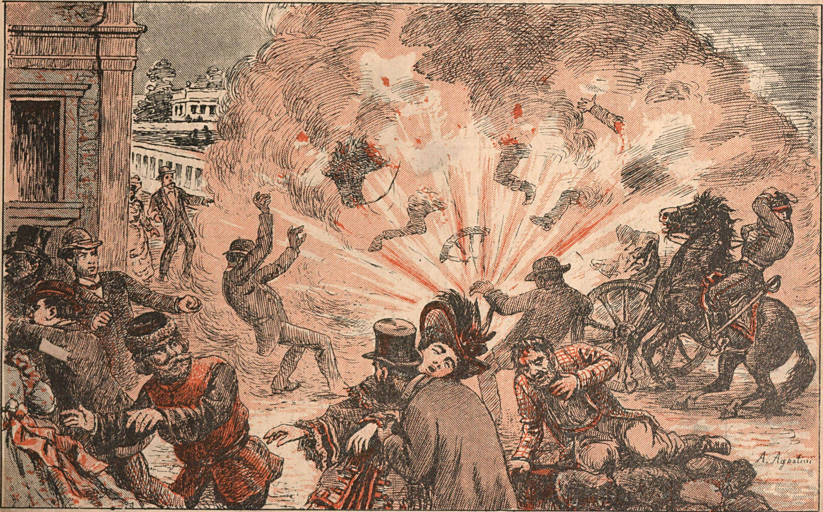 O Sr. Sr. Plehwe dirigia-se para a estação da estrada de ferro, quando, ao aproximar-se sua carruagem de uma ponte, um indivíduo que saira do restaurante «Terminus» atirou uma bomba de dinamite que explodiu bebaixo do veículo. Os efeitos foram terríveis: o ministro, o cocheiro, os cavalos e o carro foram despedaçados e atirados a grande distância. Um horror!